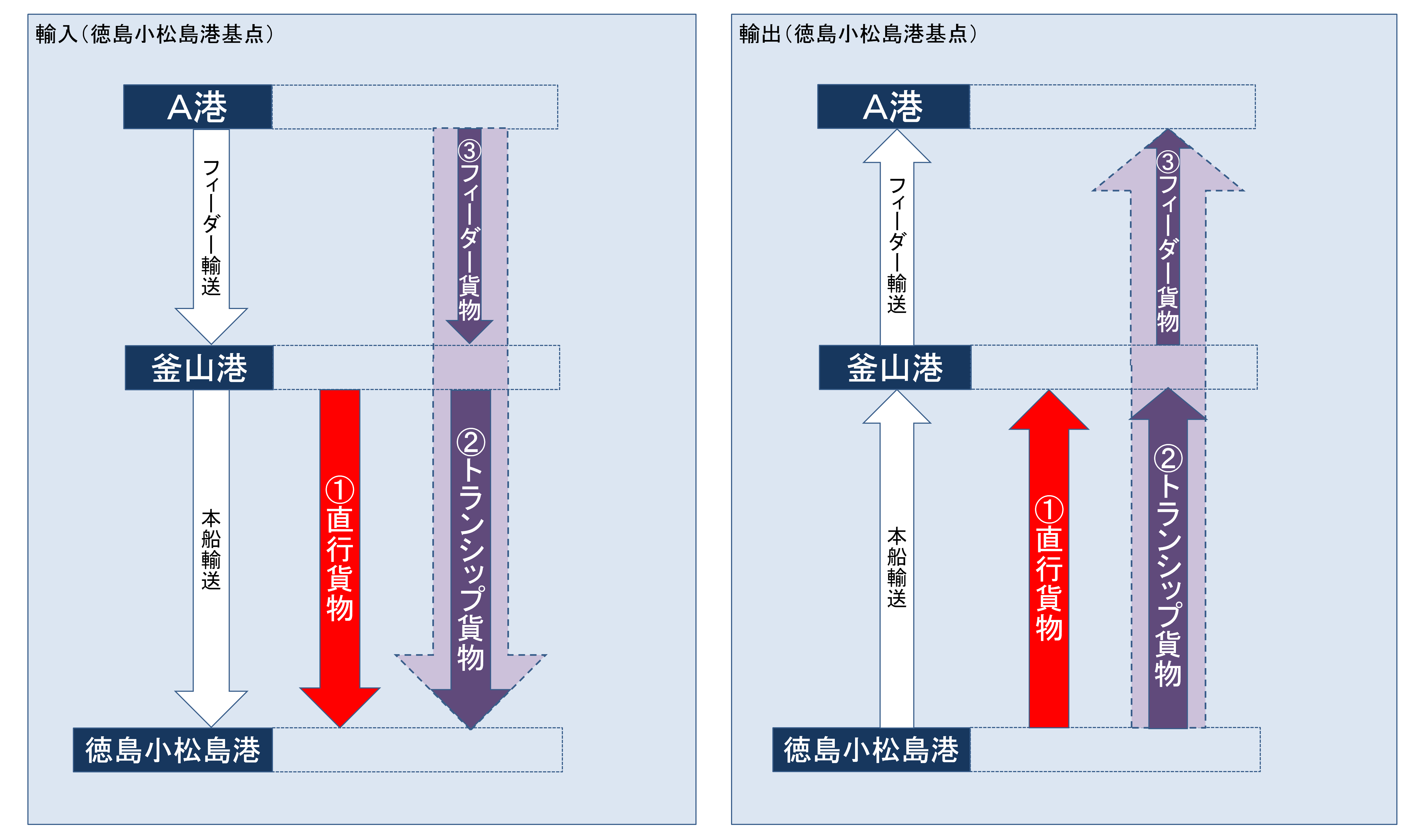 貨物流動イメージ図（釜山航路）